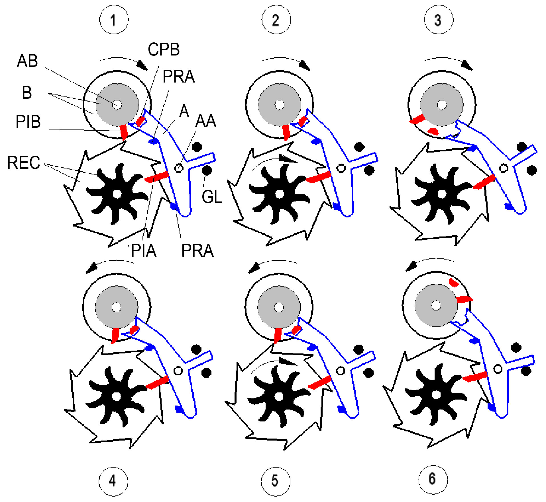 Fonctionnement de l'échappement co-axial